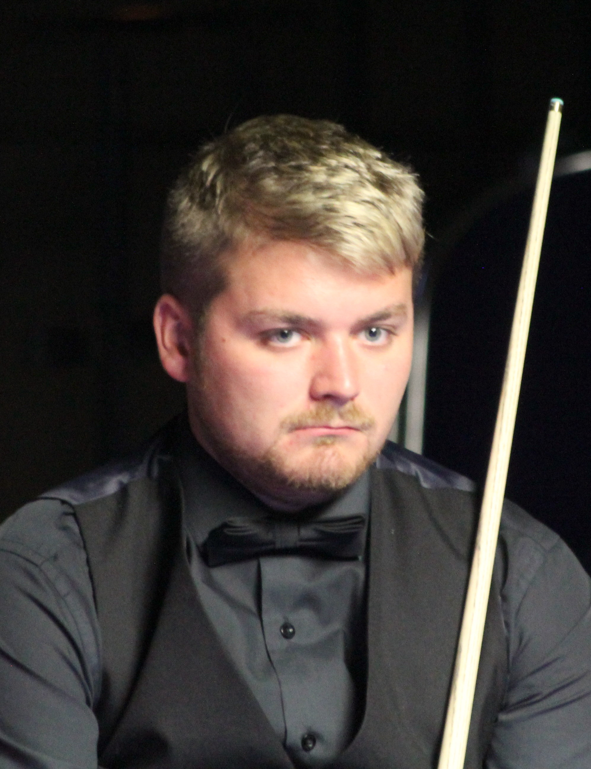 Michael White beim Paul Hunter Classic 2016